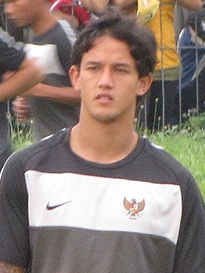 Irfan Bachdim